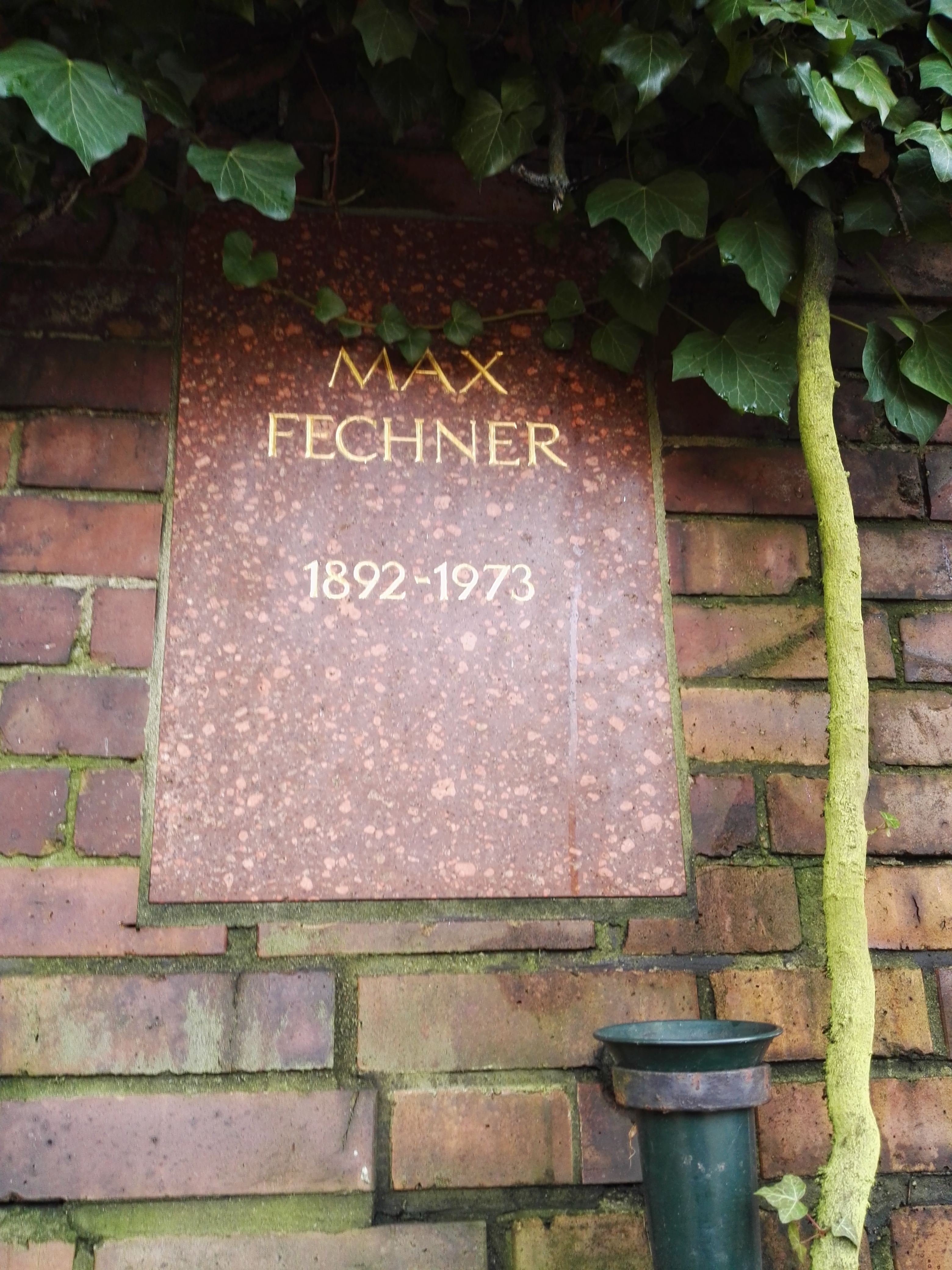 Grab von Max Fechner in der Gedenkstätte der Sozialisten auf dem Zentralfriedhof Friedrichsfelde in Berlin-Lichtenberg